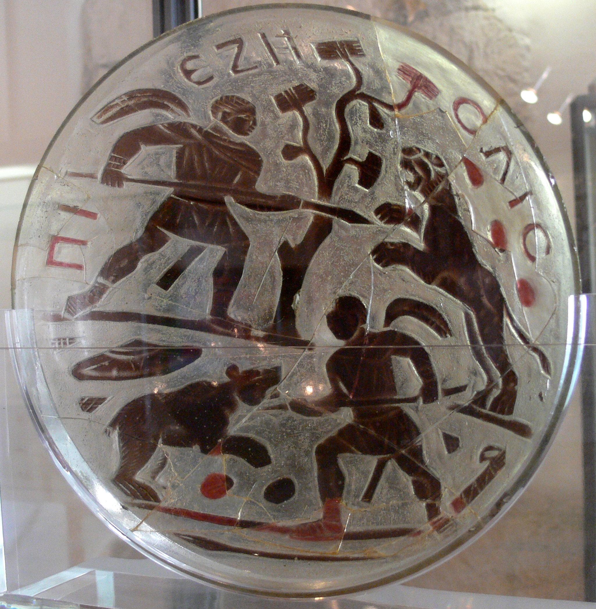 Schaffhausen, Museum zu Allerheiligen, Dauerausstellung zur regionalen Archäologie (vor der Neuaufstellung) "Jagdschale" aus Tasgetium (bei Stein am Rhein), Gräberfeld "I de Hofwiese", Grabbeigabe, 3. /4. Jahrhundert; zweifarbige Glasschale mit Darstellung einer Panther- und Bärenjagd bzw. Tierhetze im Zirkus. Inschrift: PIE ZESIAS (Trinke und lebe); Ausgrabung 1969/1970